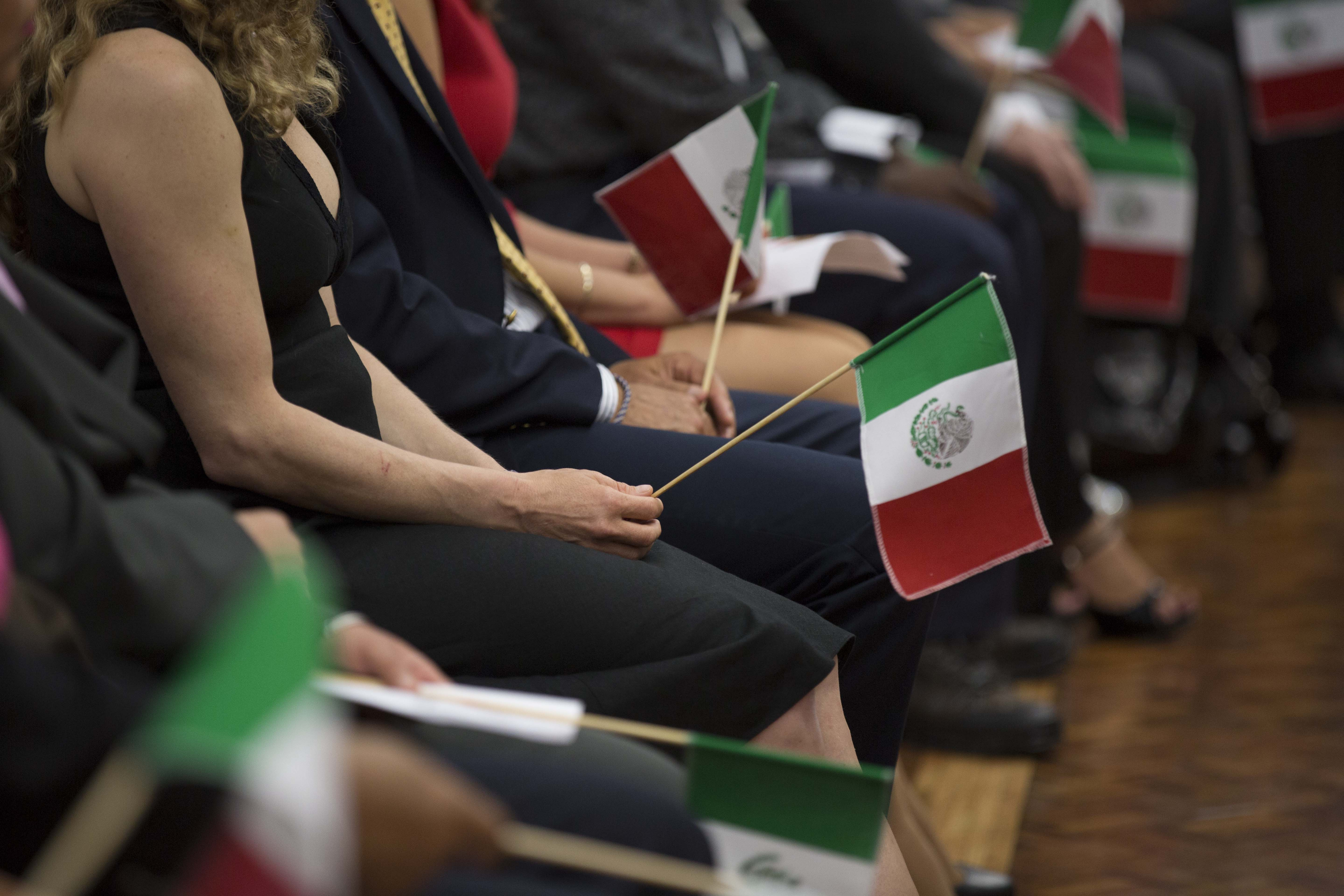 Nuevos mexicanos con banderas durante la entrega de cartas de naturalización. Residencia Oficial de los Pinos, Ciudad de México. 16 de abril de 2014.